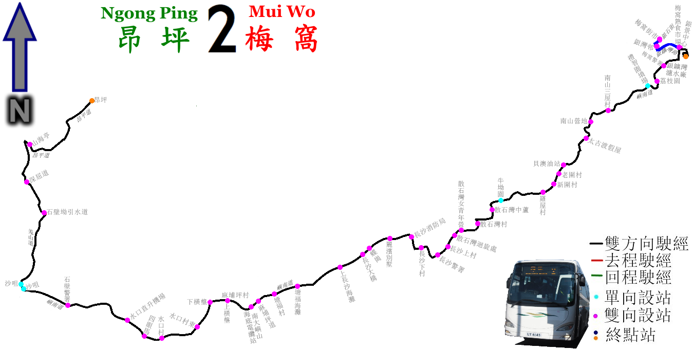 中文（香港）: 新大嶼山巴士2路線的走線圖